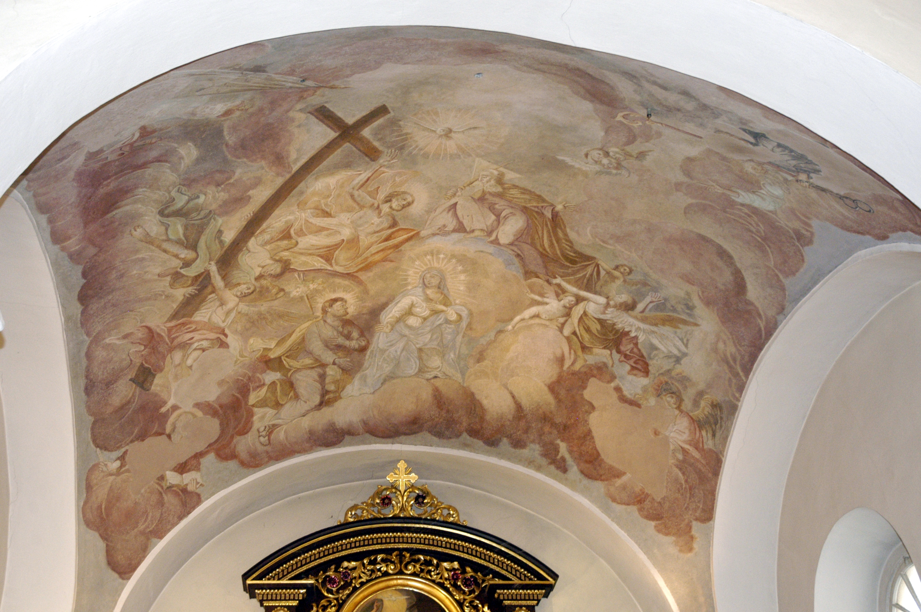 Deckenbemalung im Chor der katholischen Pfarrkirche Maria Verkündigung in Goggendorf